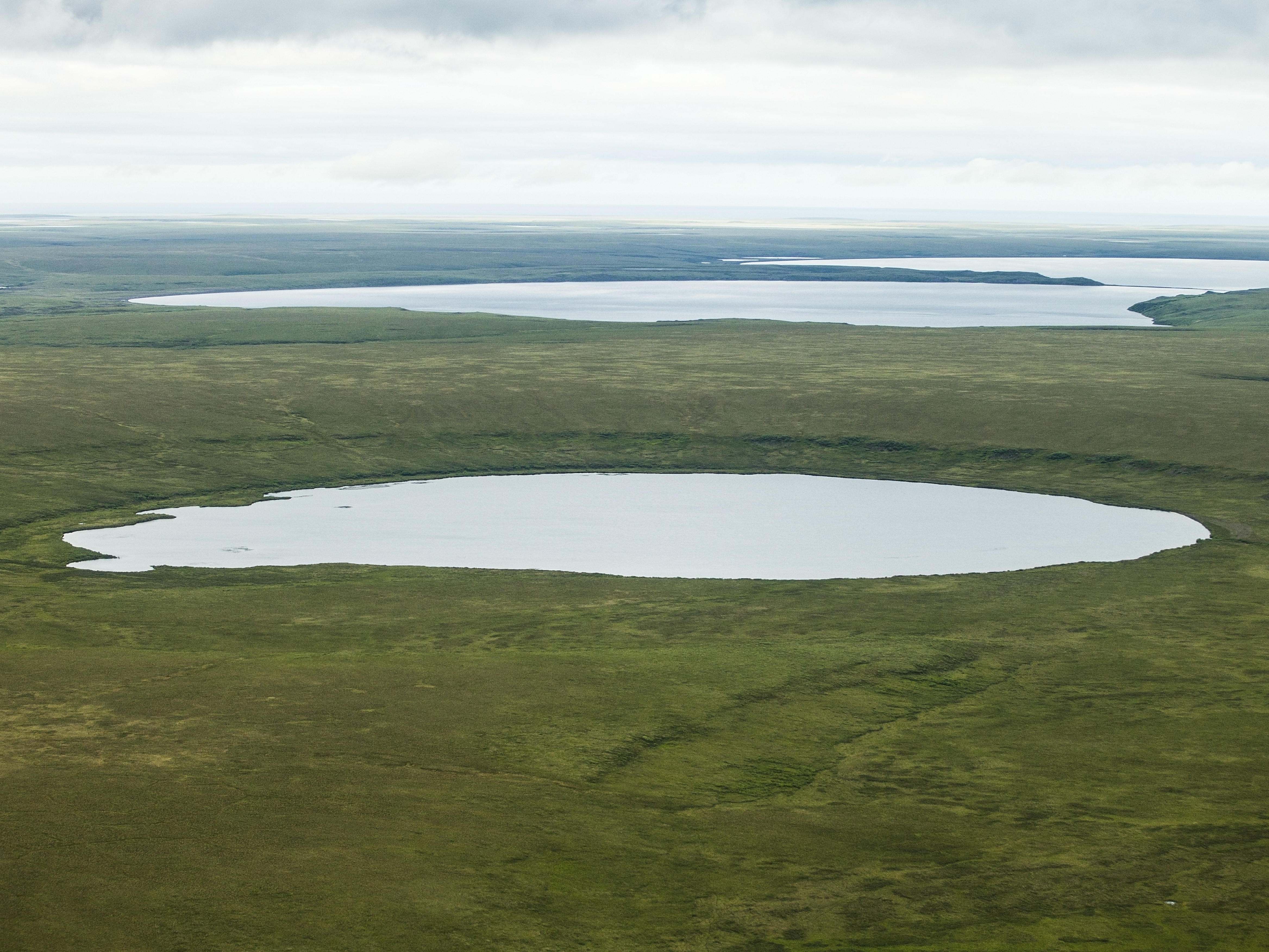 Whitefish maar lake- 2 Edit